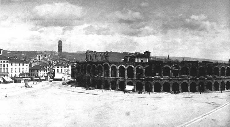 Piazza Bra e l'Arena di Verona, in una foto d'epoca.